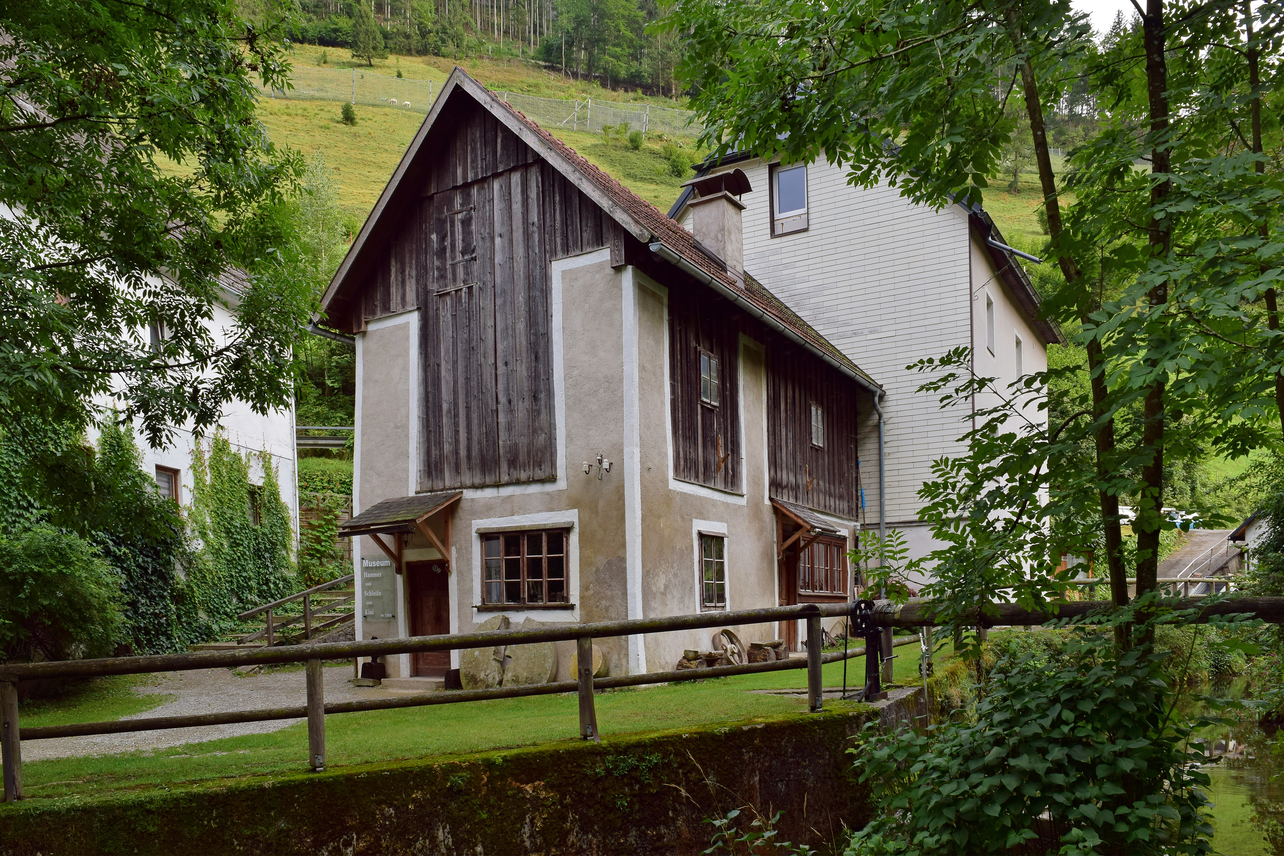 Schleiferei am König, auch "Schmiede zum Kini" genannt